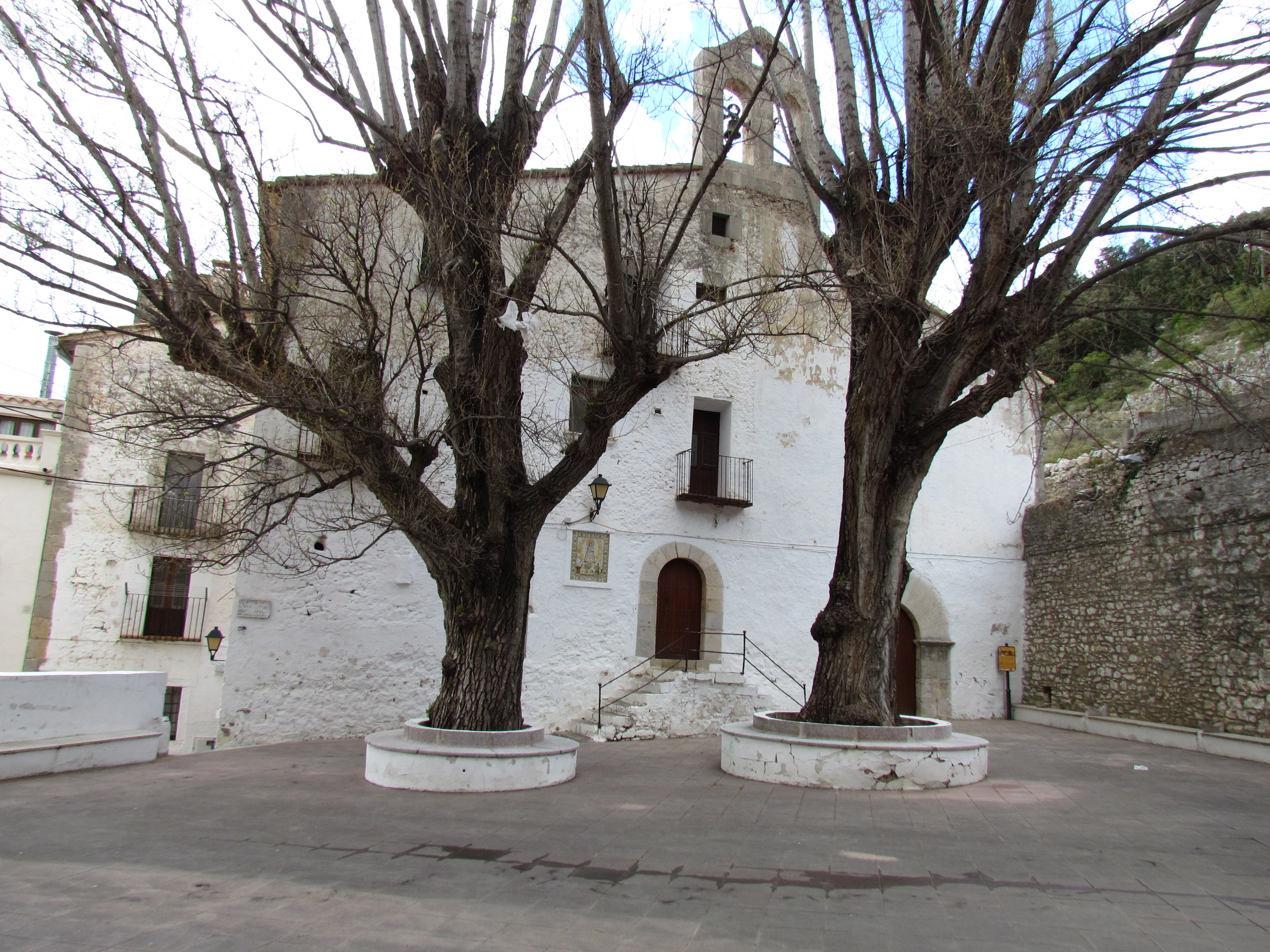 Façana de l'ermita de la Mare de Déu de l'Avellà de Catí, Alt MaestratUnknown fachada de la ermita de la virgen del avellá de catí (castellón, españa)